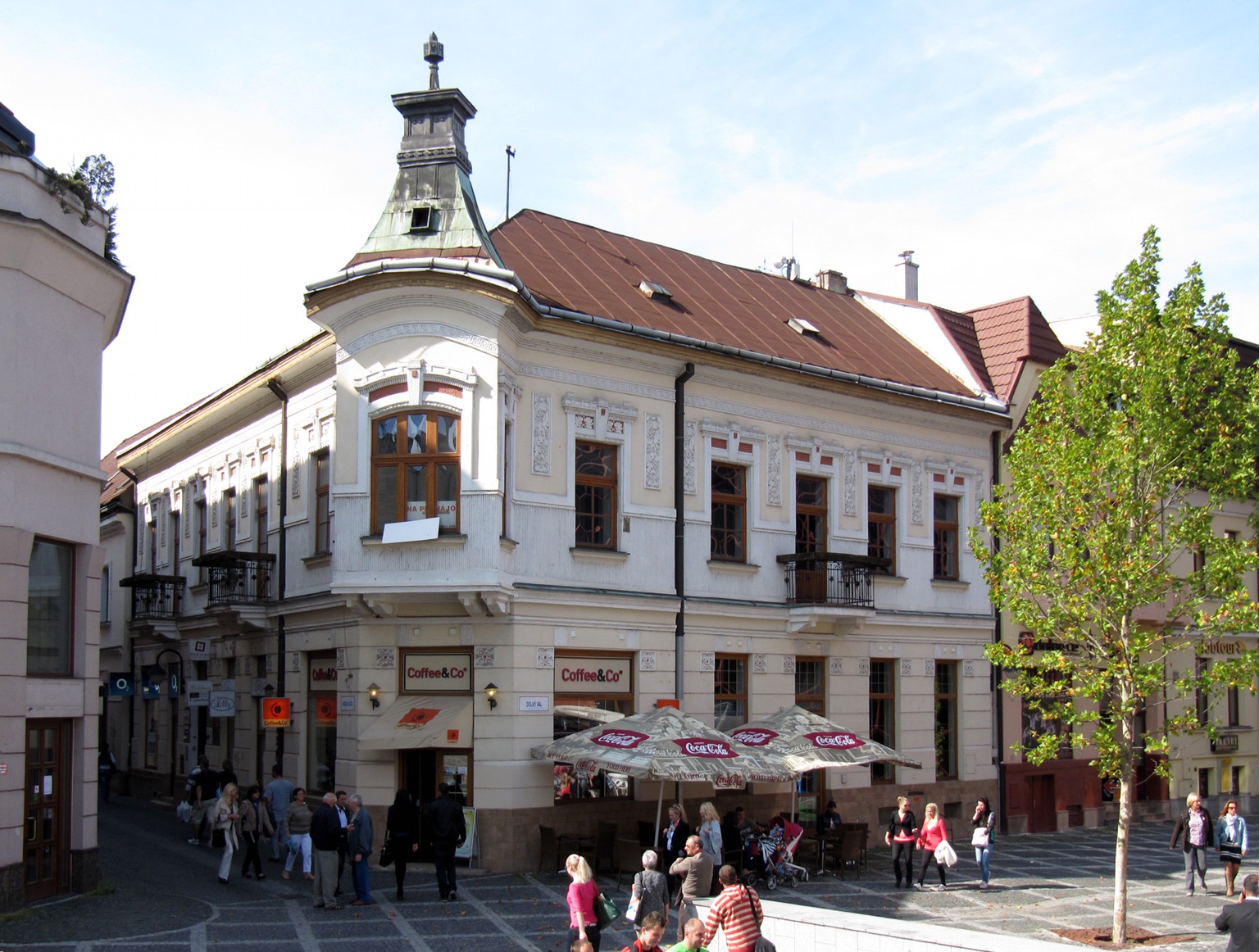 DOM BYTOVÝ, Dolný val 1